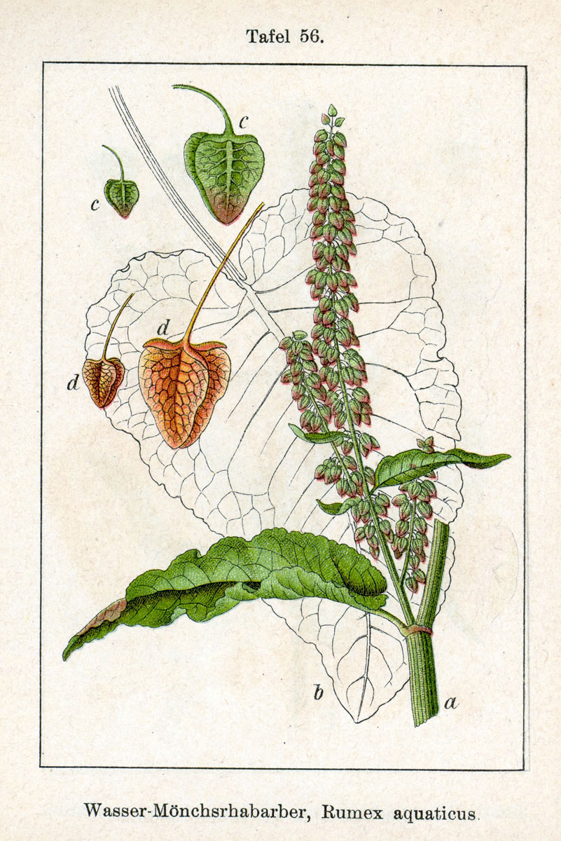 Rumex aquaticus L. Original Description Wasser-Mönchsrhabarber, Rumex aquaticus